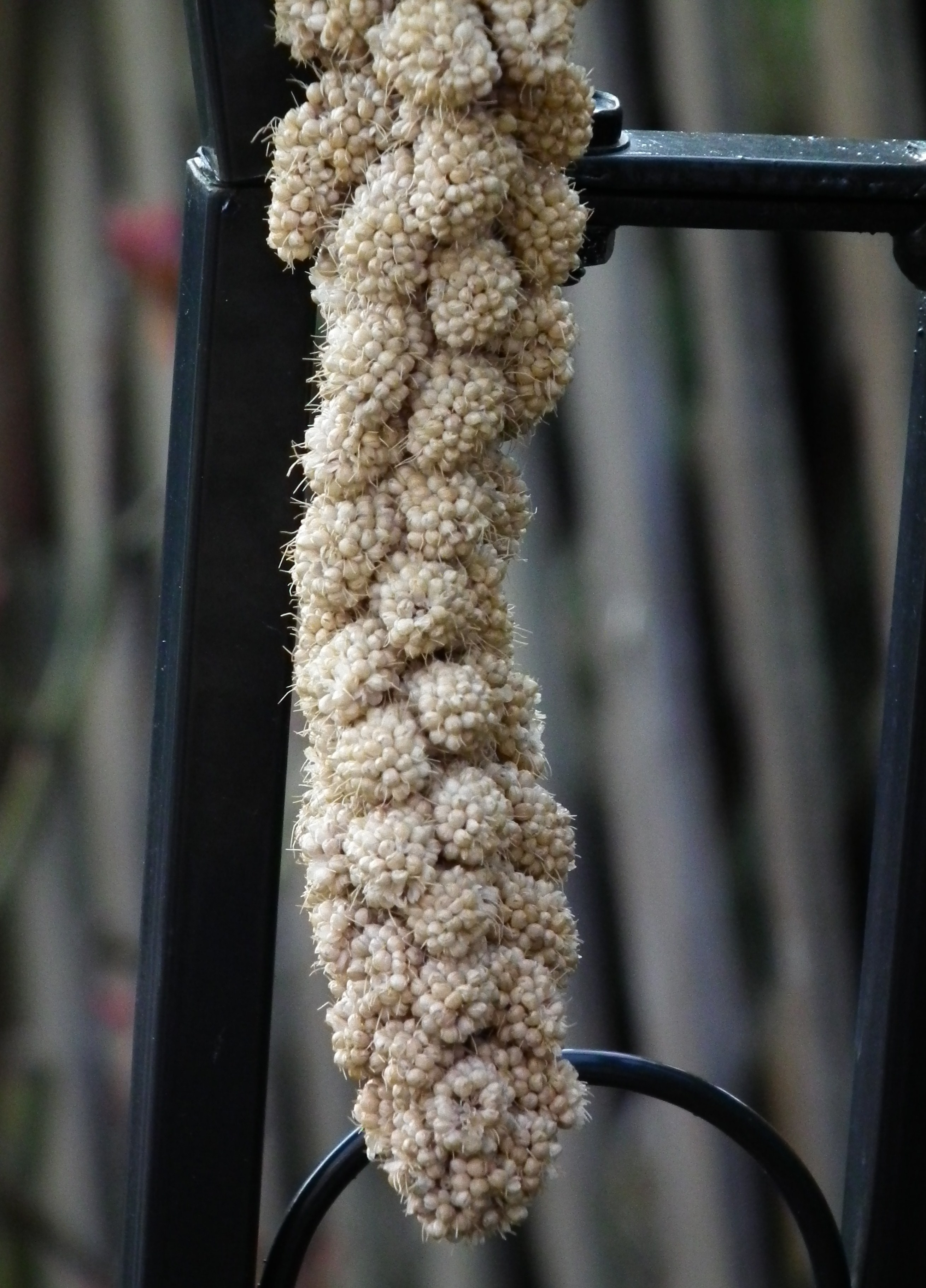 Kolbenhirse (Setaria italica) als Winterfütterung für Gartenvögel